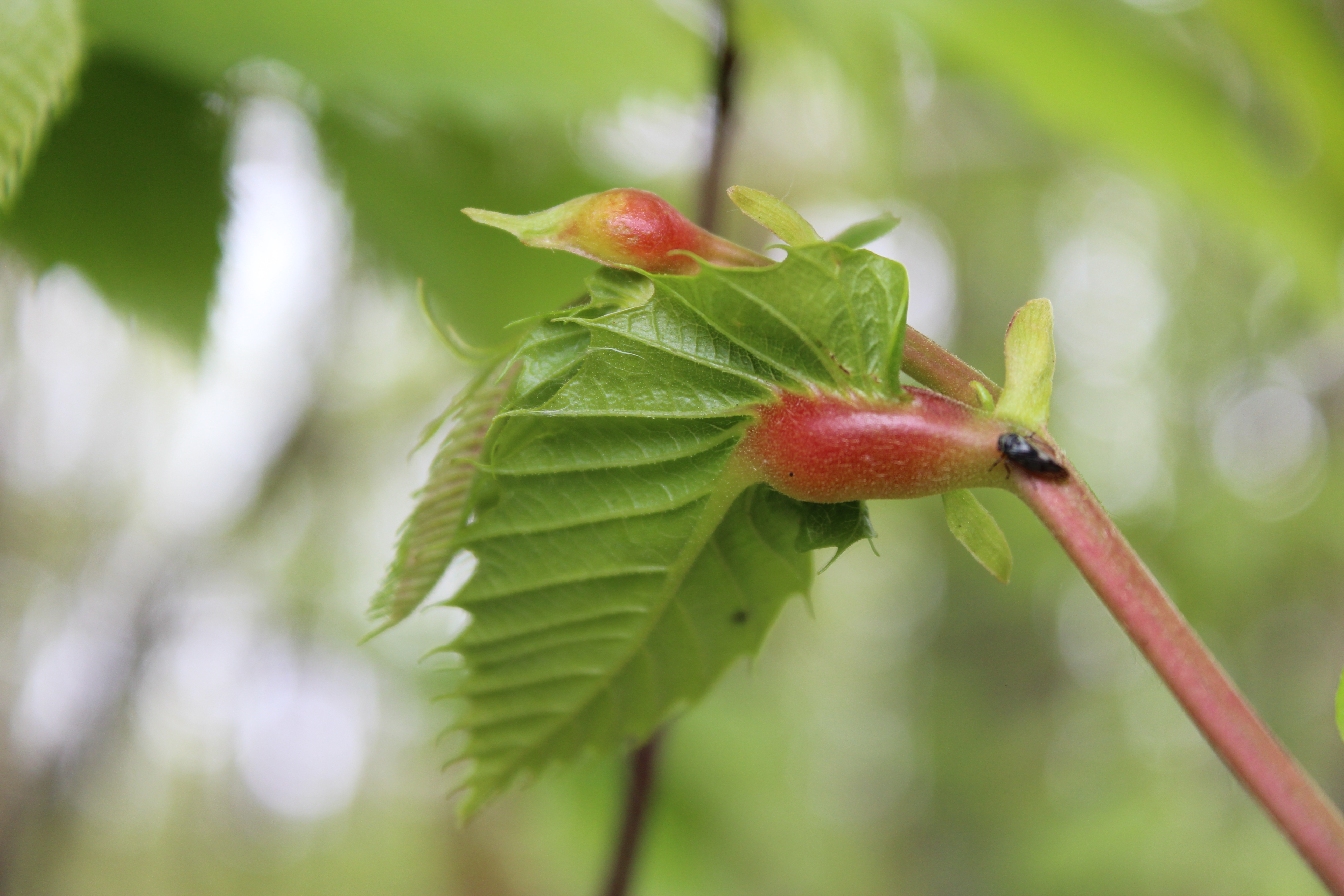 Galle, Cynips du châtaignier (Dryocosmus kuriphilus)